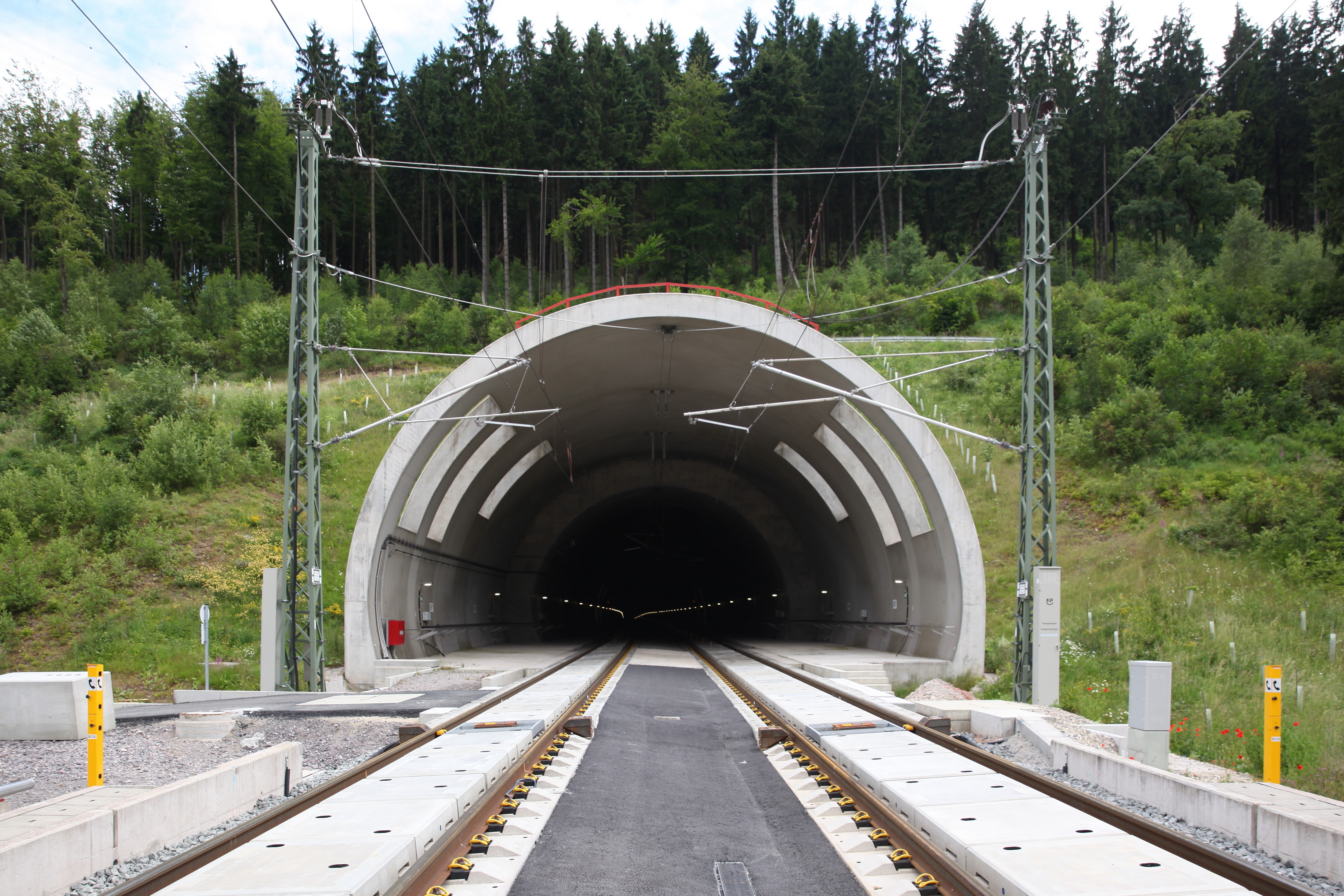 Nordportal Tunnel Silberberg